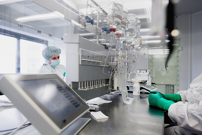 Herstellung parenteraler Ernährung unter einem Laminar-flow, Apotheke Universitätsklinikum Essen